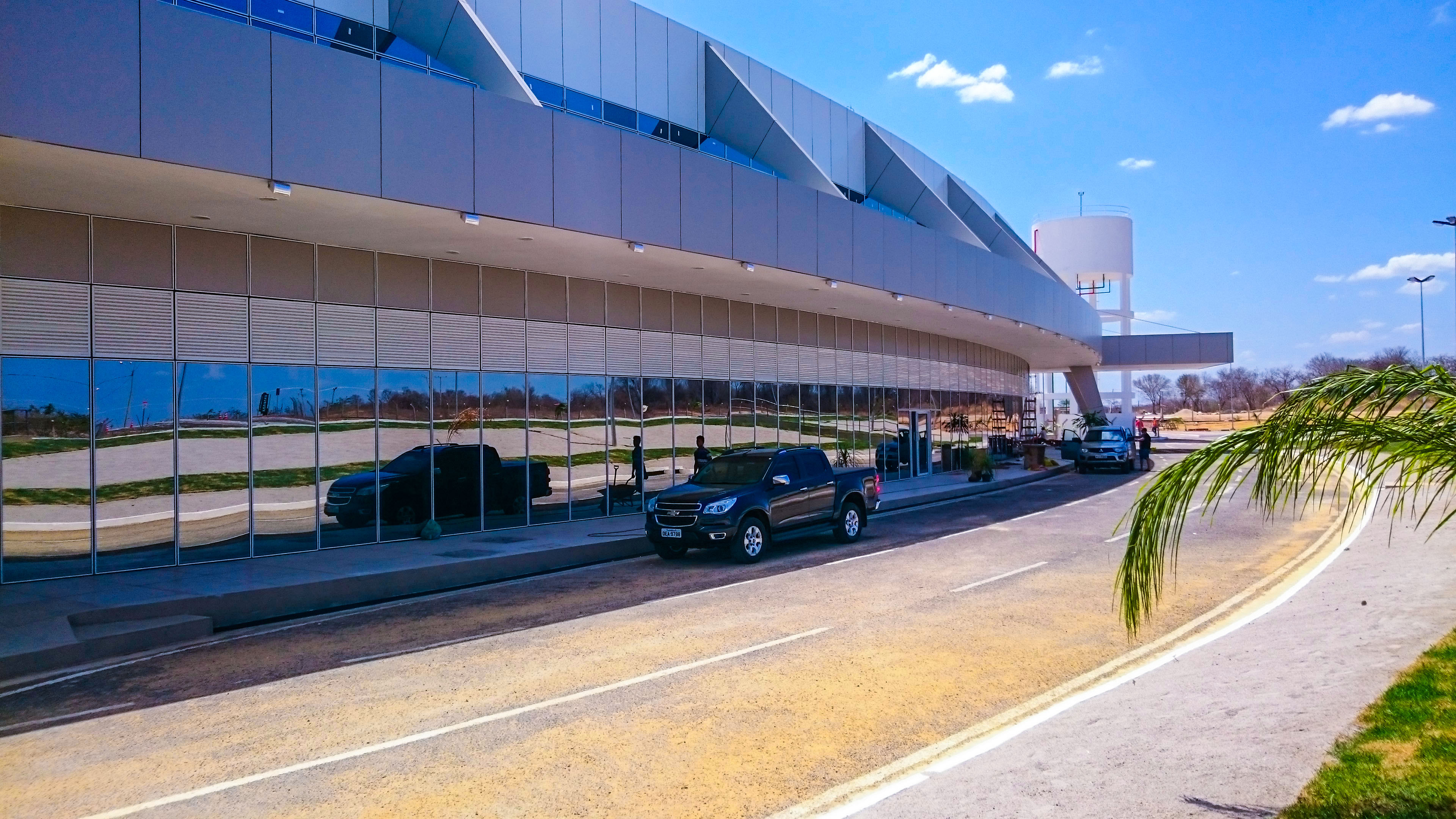 Fachada do Terminal do Aeroporto Serra da Capivara